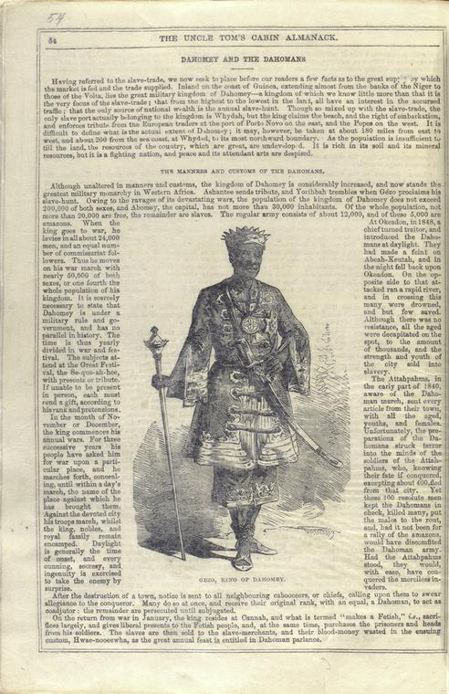 Gezo, King of Dahomey